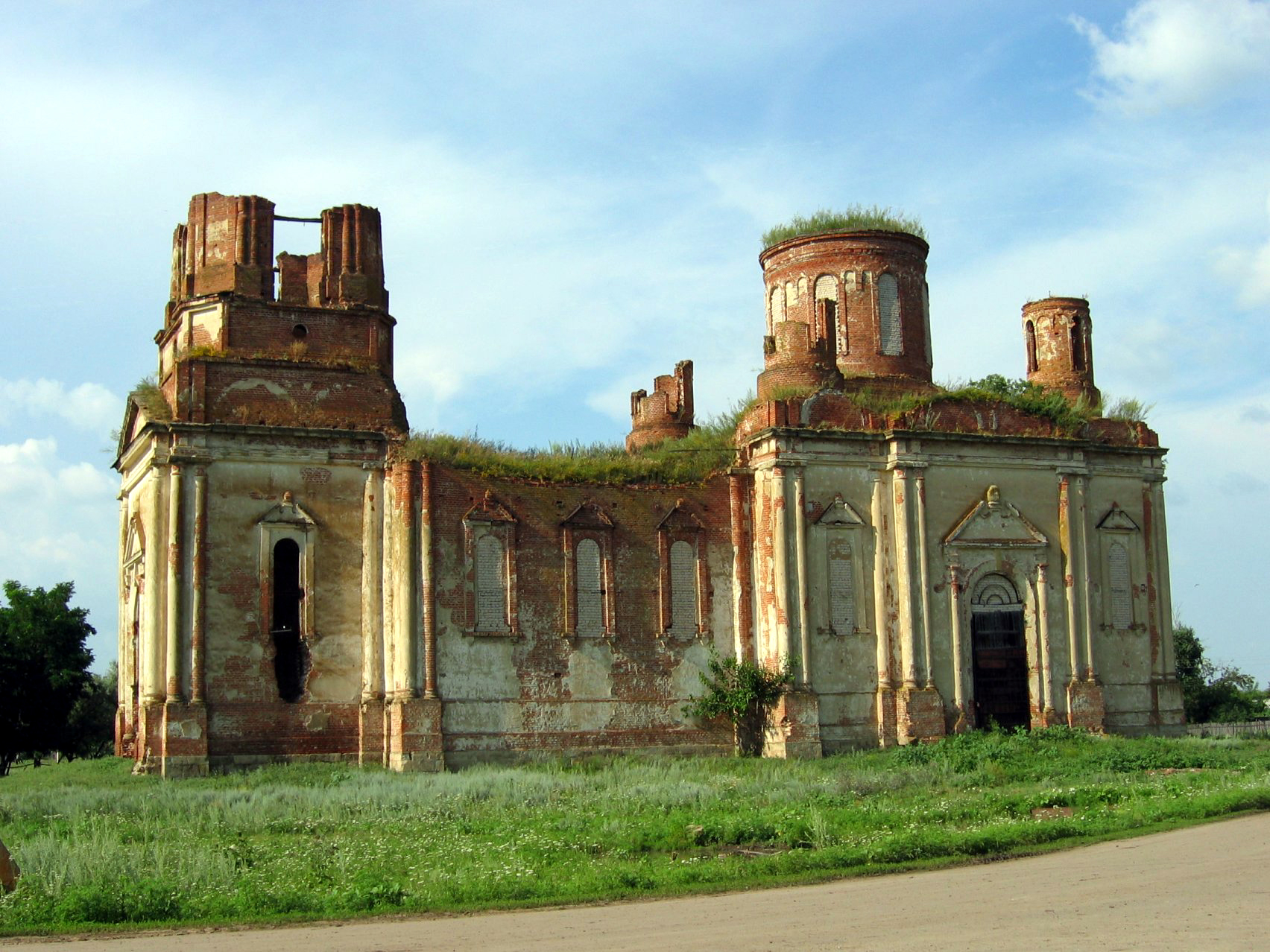 Церковь